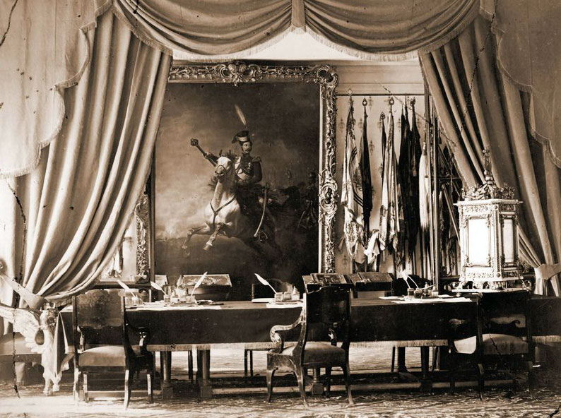 Интерьер атаманского дворца Новочеркасск